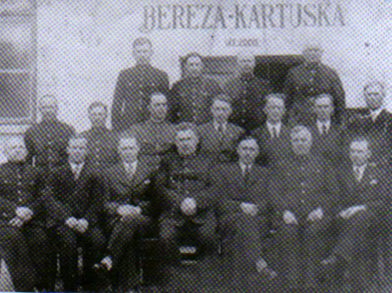 Керівництво польського концтабору "Береза Картузька"